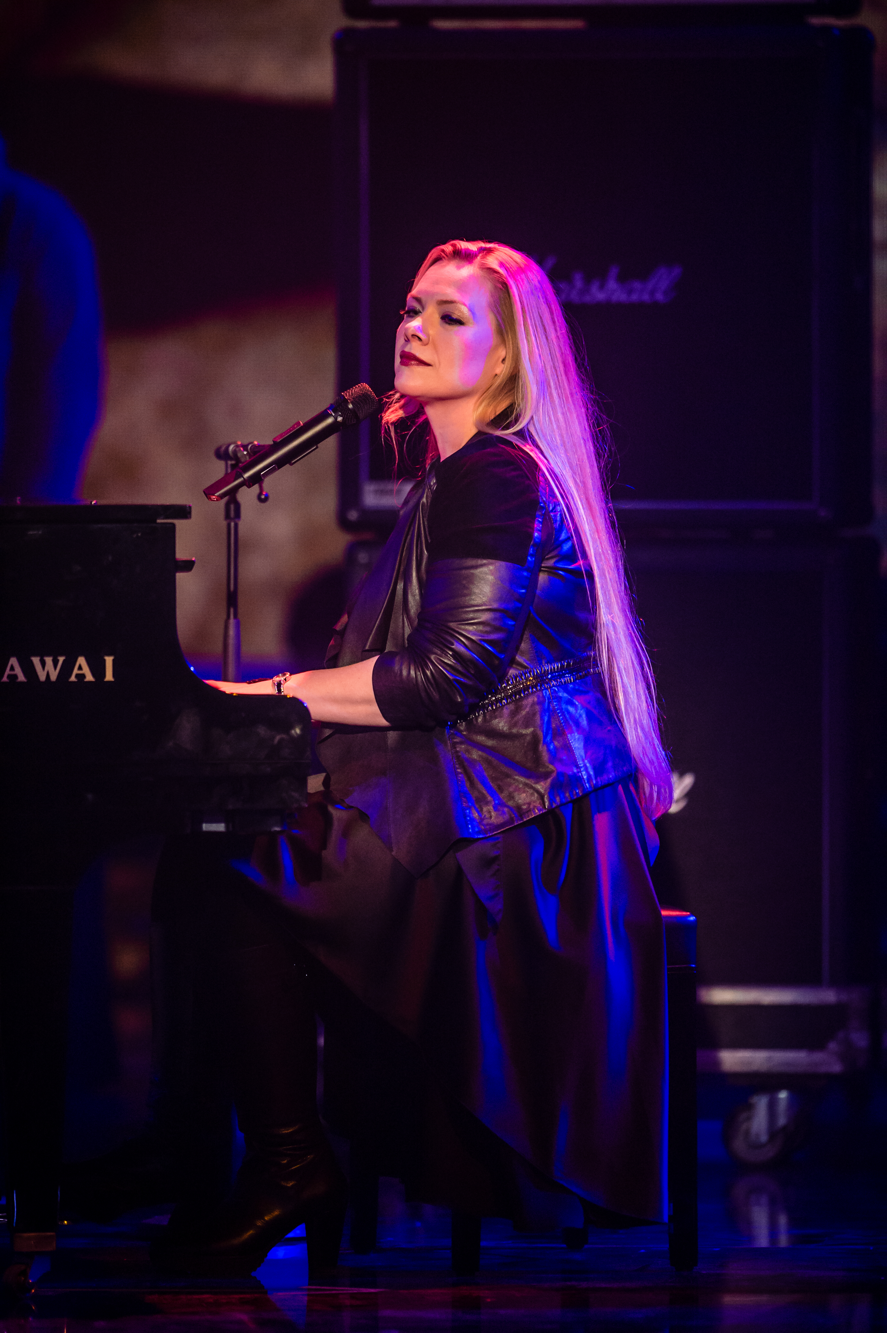 Eurovision Song Contest 2016 - Unser Lied für Stockholm - Avantasia